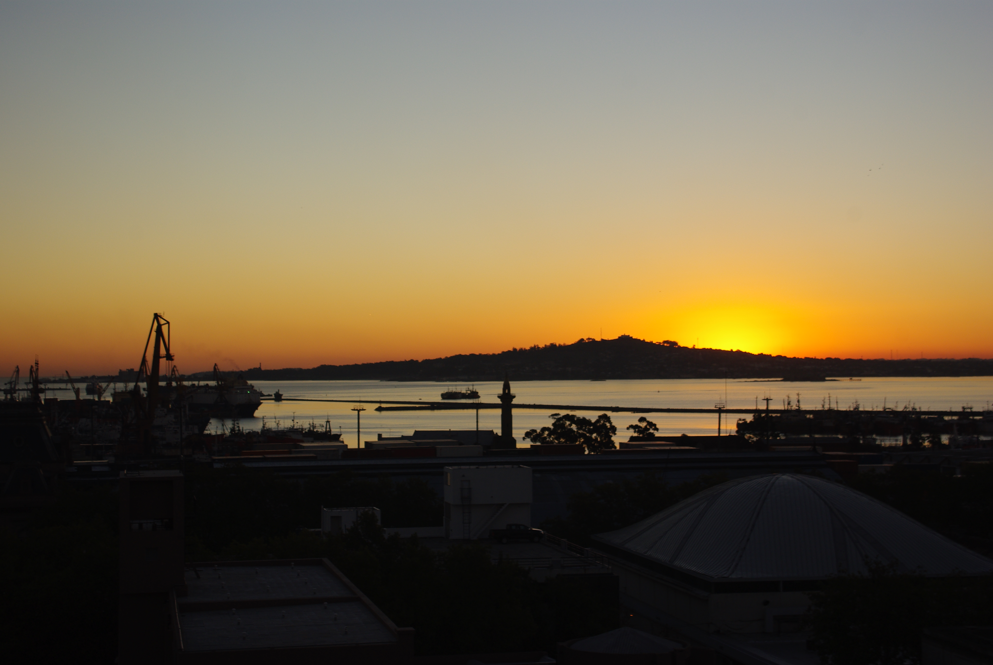 Faro del Cerro de Montevideo. Ubicada en el departamento de Montevideo